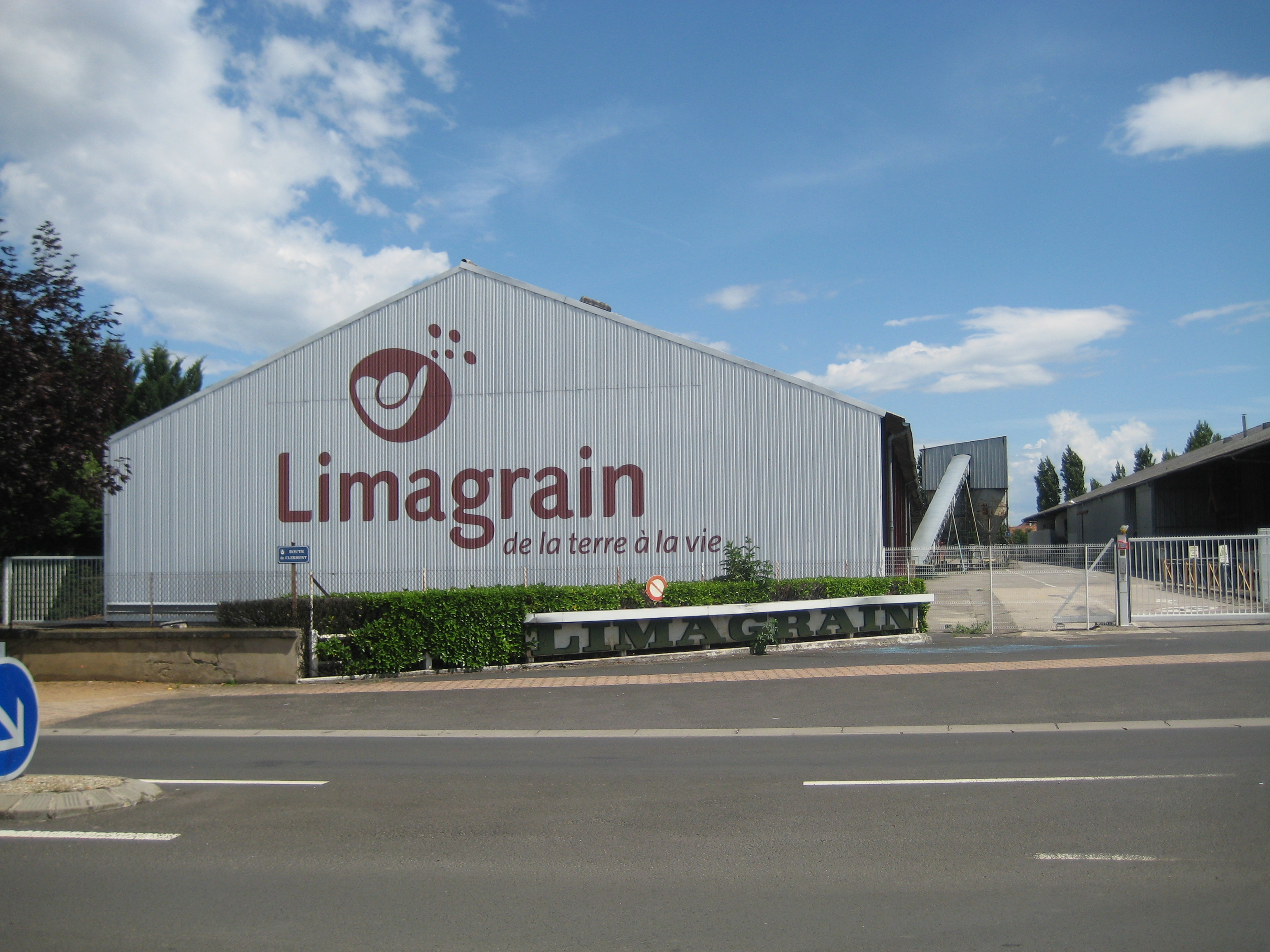 Bâtiments de l'entreprise Limagrain, à Chappes